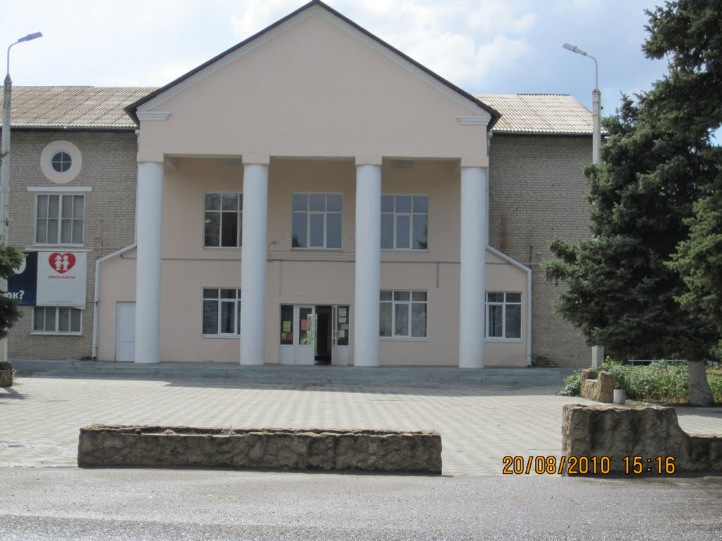 Дворец культуры (по совместительству ЗАГС) в станице Архангельской